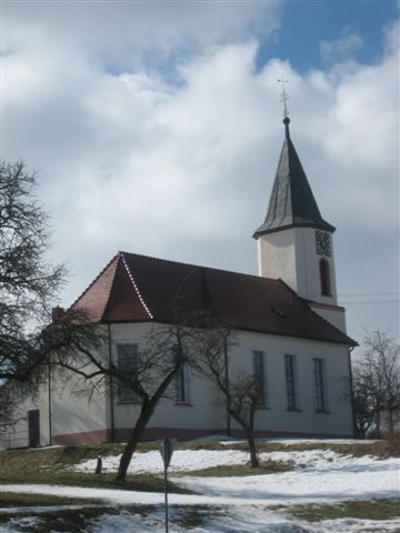 Kath. Kirche St. Peter und Paul in Bachheim